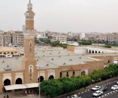 صور جوية لمسجد عبدالله بن العباس